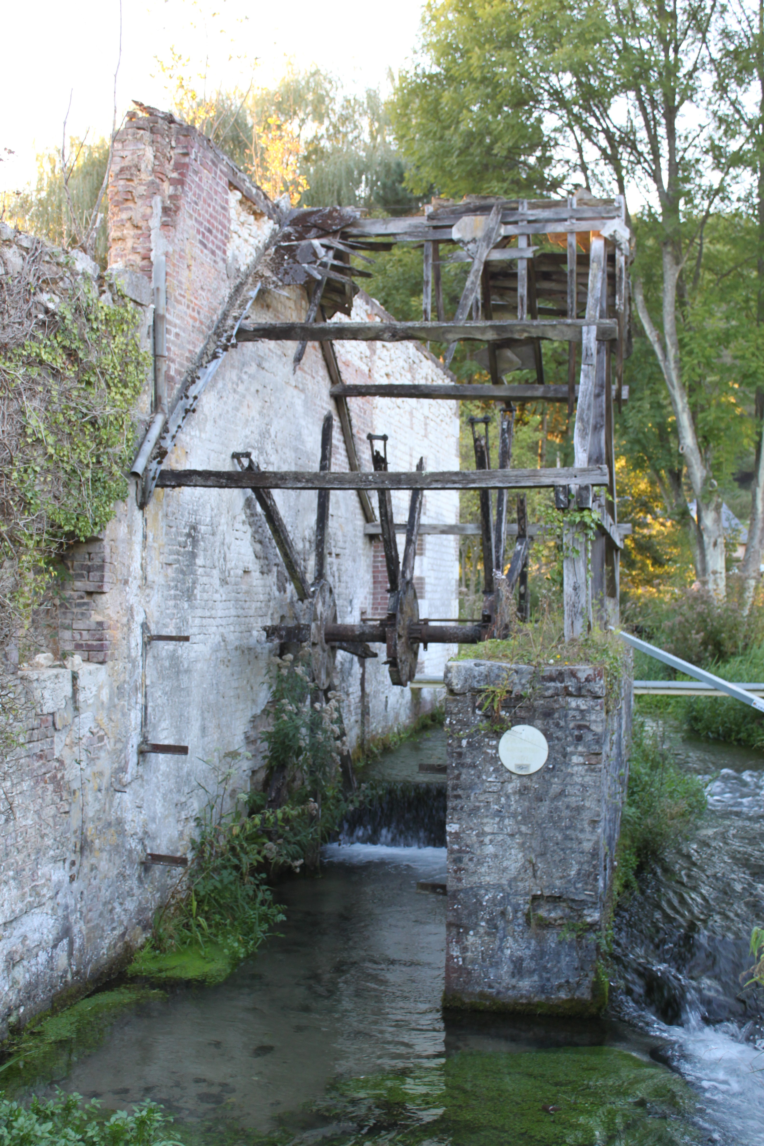 L’ancien moulin à eau de Sainte-Gertrude, en Haute-Normandie.